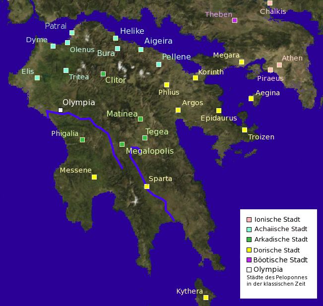 Karte der Peloponnes in klassischer Zeit mit Städten und deutscher Beschriftung.